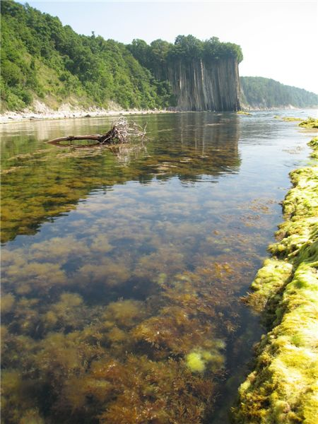 Скалы Киселева (или скала слез)